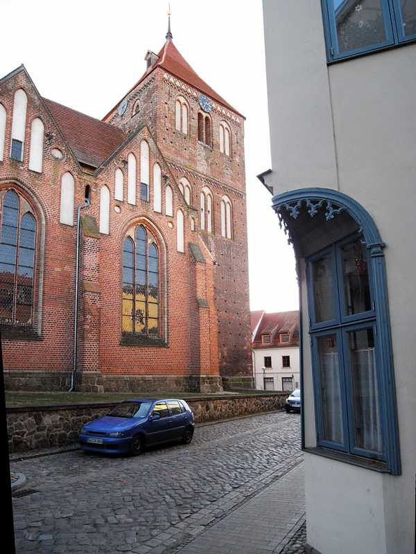 Kirche in Teterow